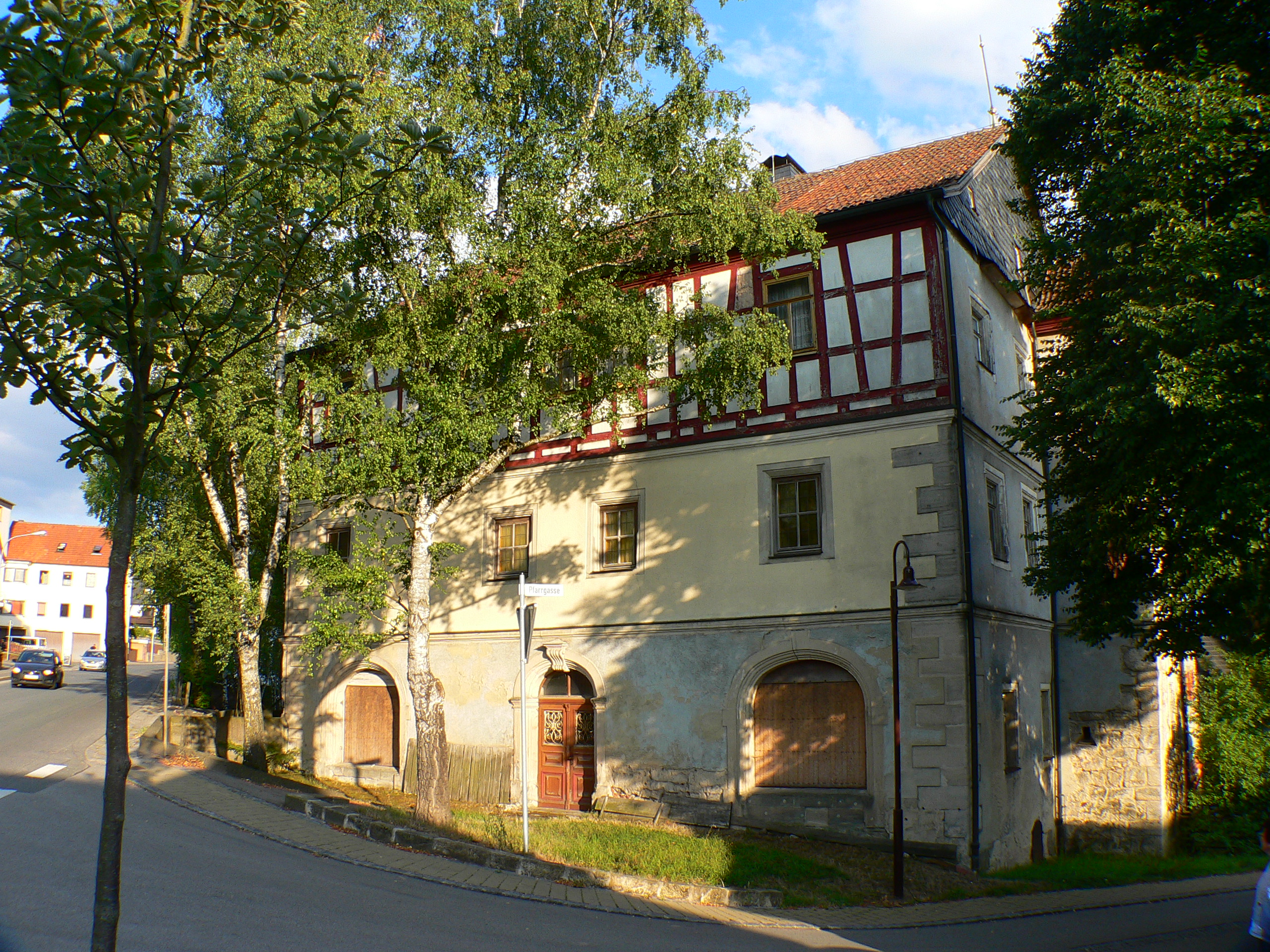 Oberes Schloss in Untersiemau, Kreis Coburg, Bayern